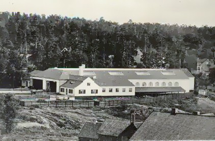 Gamla spårvagnshallarna vid Lillsjön där bensinmacken ligger i dag